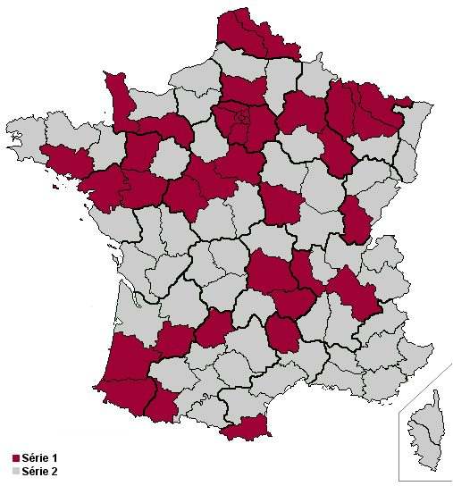 Carte des départements dans lesquels sont élus les deux séries de membres du Sénat français.